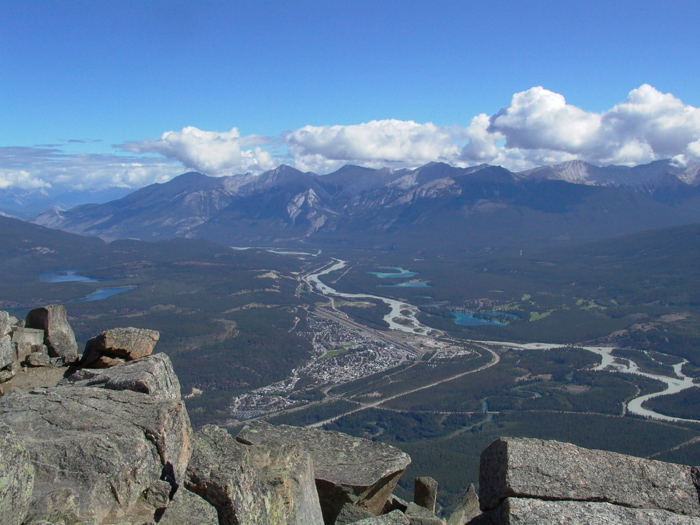 Picture taken by Daniel van der Ree, The Netherlands